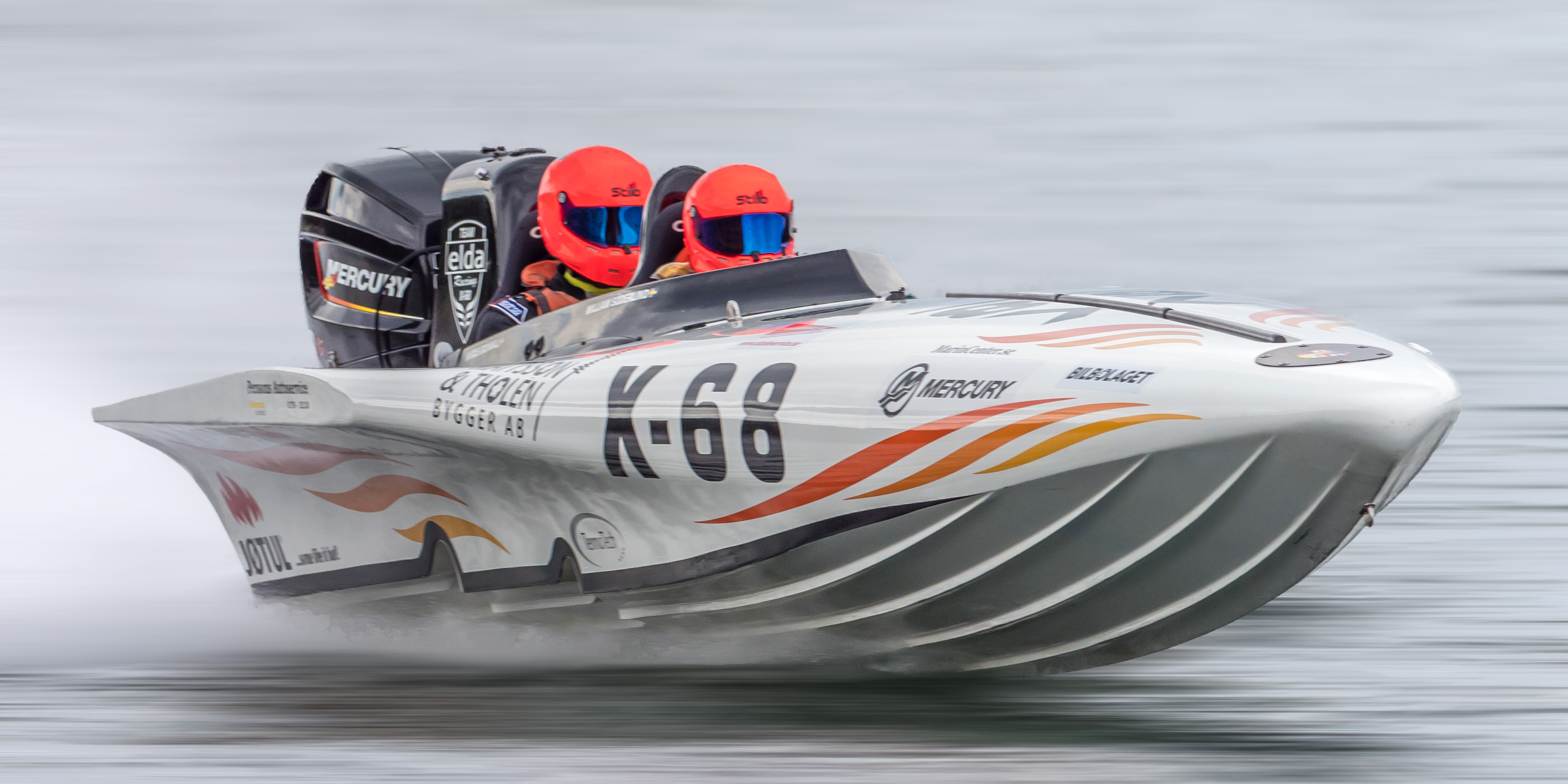 Roslagsloppet 2018, Arholma, Norrtälje, Sweden 2018